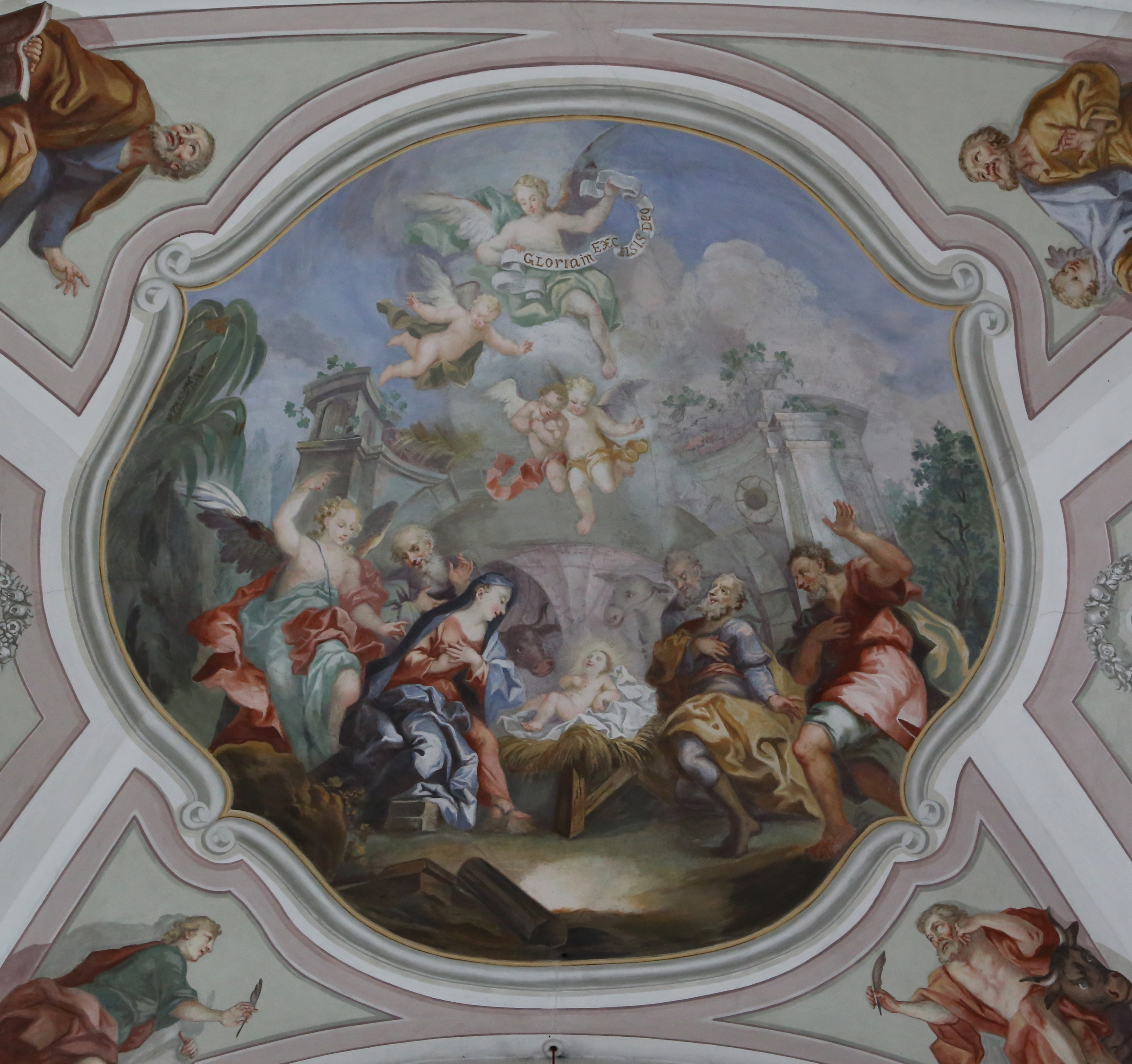 Kath. Pfarrkirche St. Ursula, Unterlangkampfen